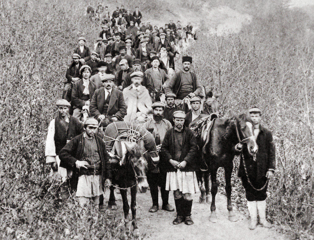 Пренесување_на_телото_на_Јане_Сандански, 1915